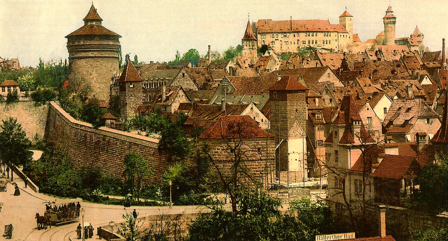 Vue de Nuremberg, photo ancienne environ 1895